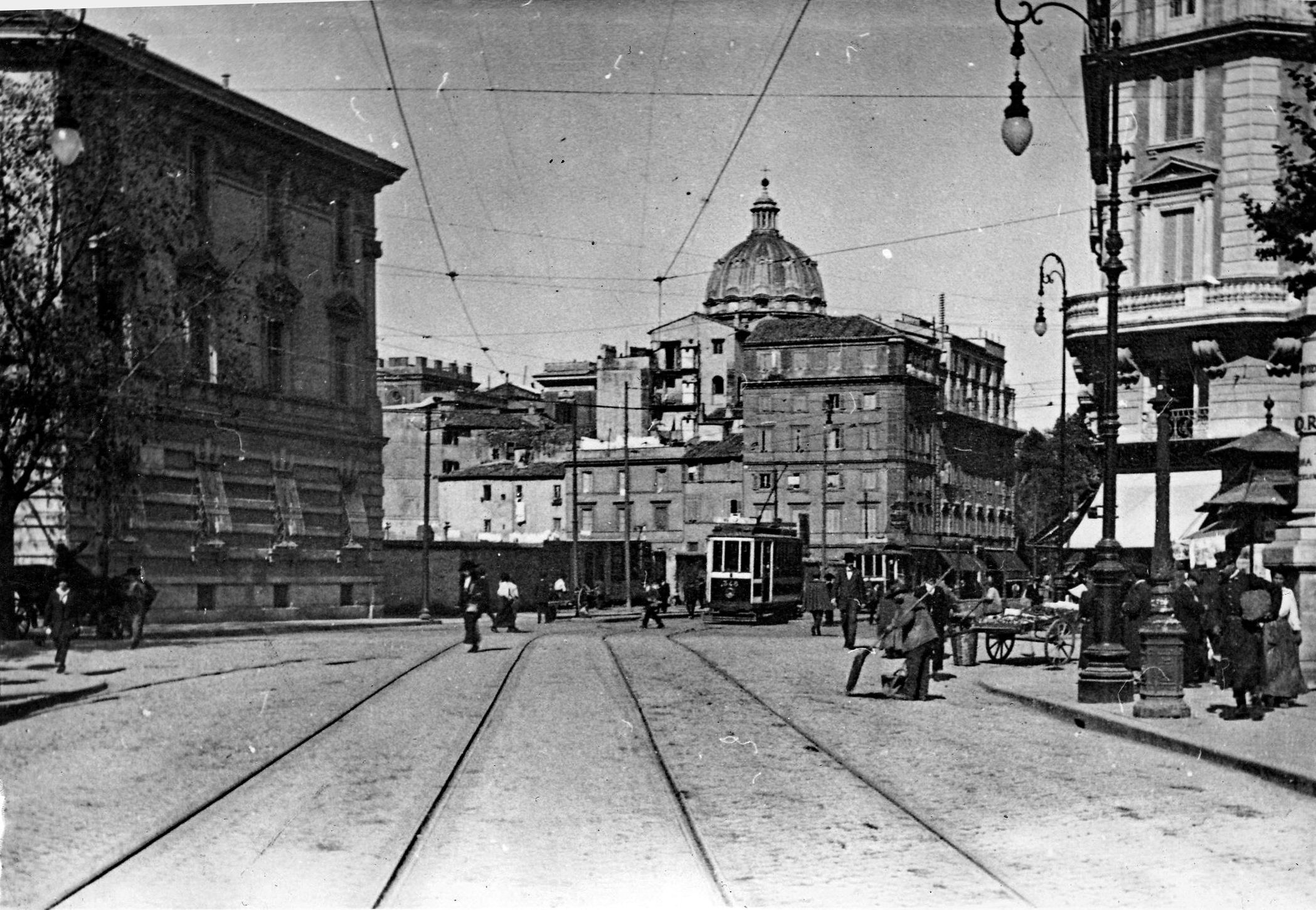 Via Arenula ante 1913 (anno d'inizio della costruzione del Ministero di Giustizia)